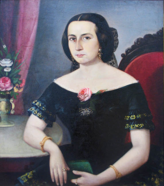 Mercedes Rueda de Ceballos de Cortes de Monroy pintada por el pintor francés Raymond Monvoisin